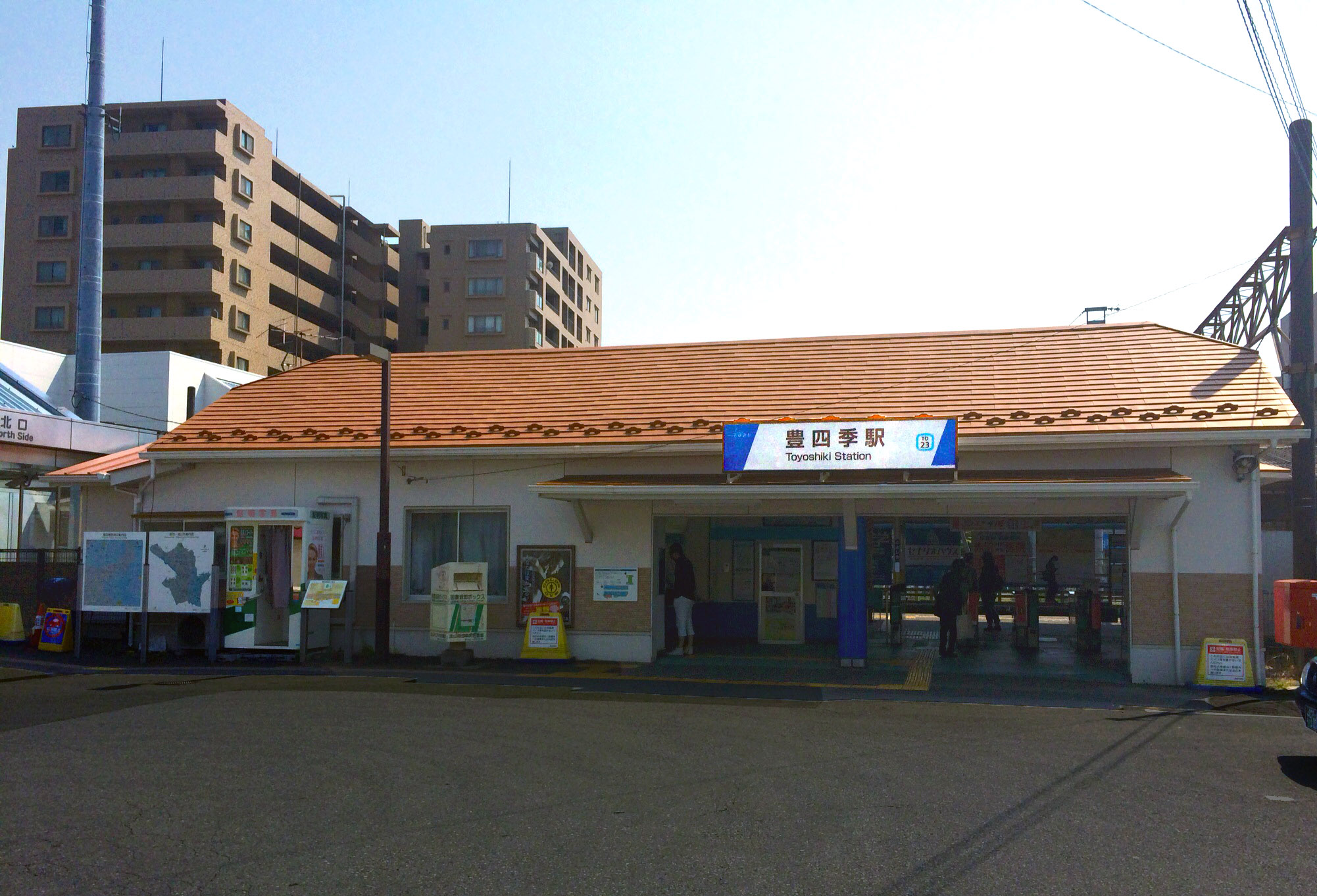 東武野田線豊四季駅